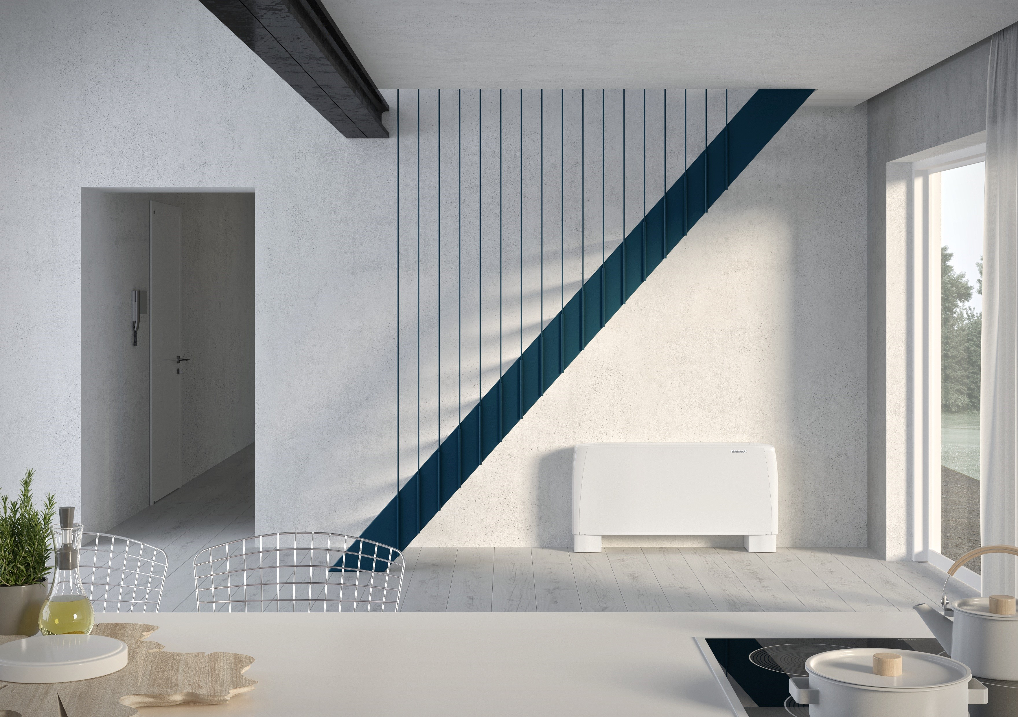 Carisma fan coil